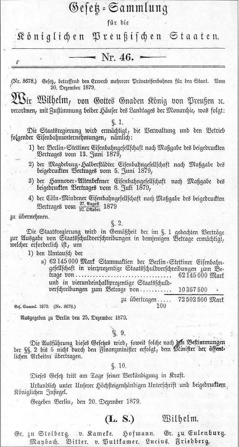 Gesetz, betreffend den Erwerb mehrerer Privateisenbahnen für den Staat. Preußische Gesetzessammlung 1879, No. 8678.